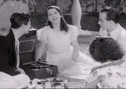 Fotografía de Libertad Lamarque y otros actores en la película Argentina Ayúdame a vivir (1936).